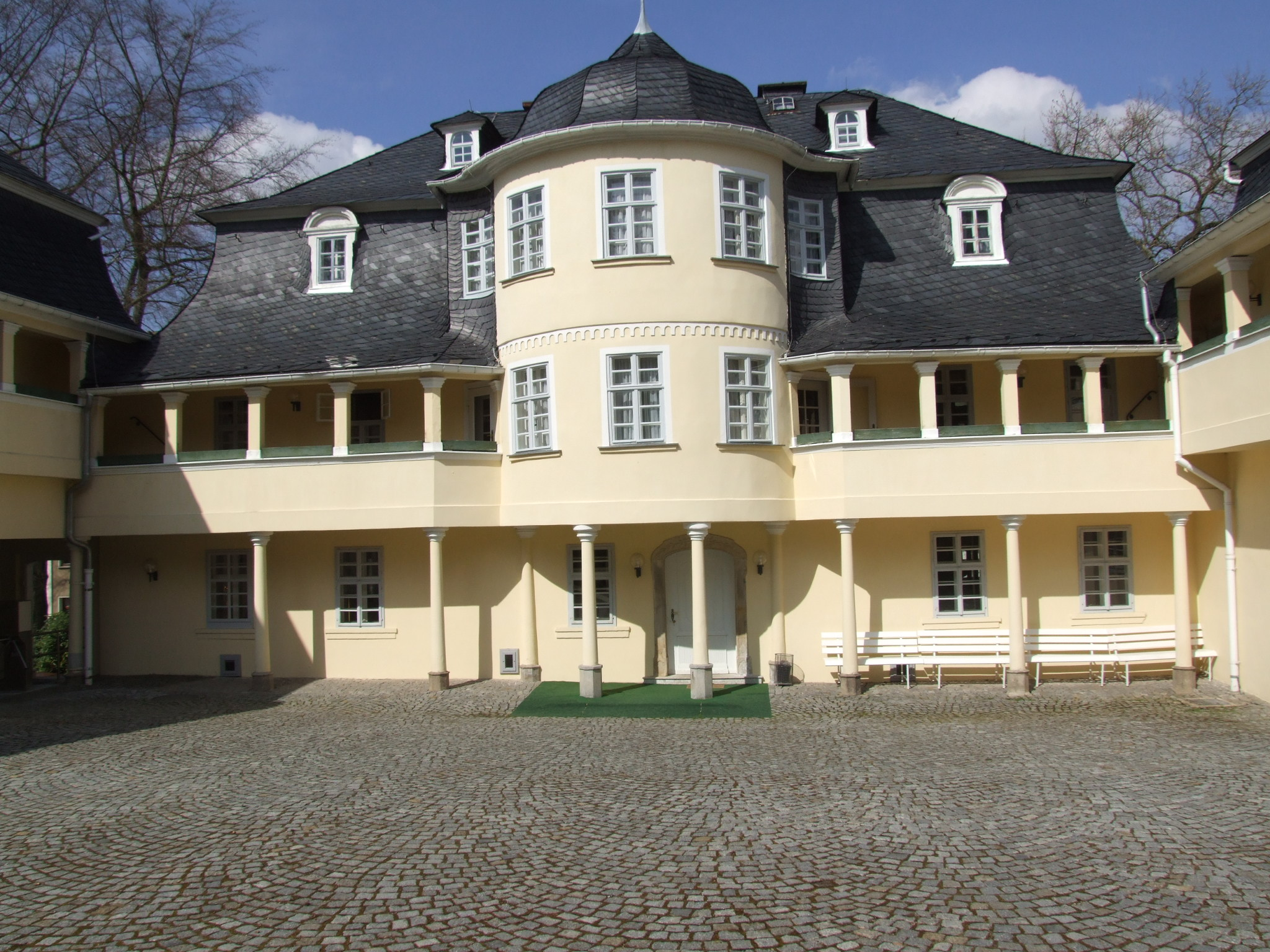 Markneukirchen, in April 2008.Music instrument museum . The museum buildings, known as the Paulus Schössel, was built in the late baroque style in 1784. Das Sammlung ist in ein spätbarockes Bürgerhaus von 1784.